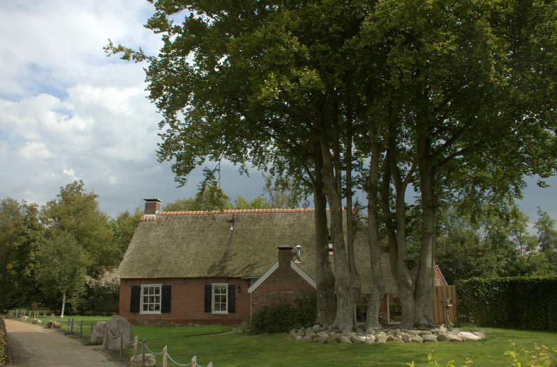 Mooi Kollumerzwaag in Friesland in de Gemeente Kollummerland Nieuwkruisland